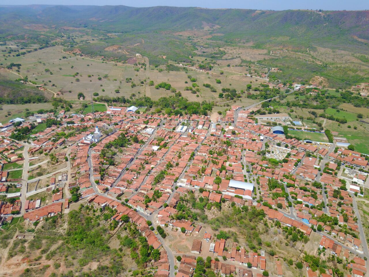 Imagem aérea da cidade de Farias Brito Ceará